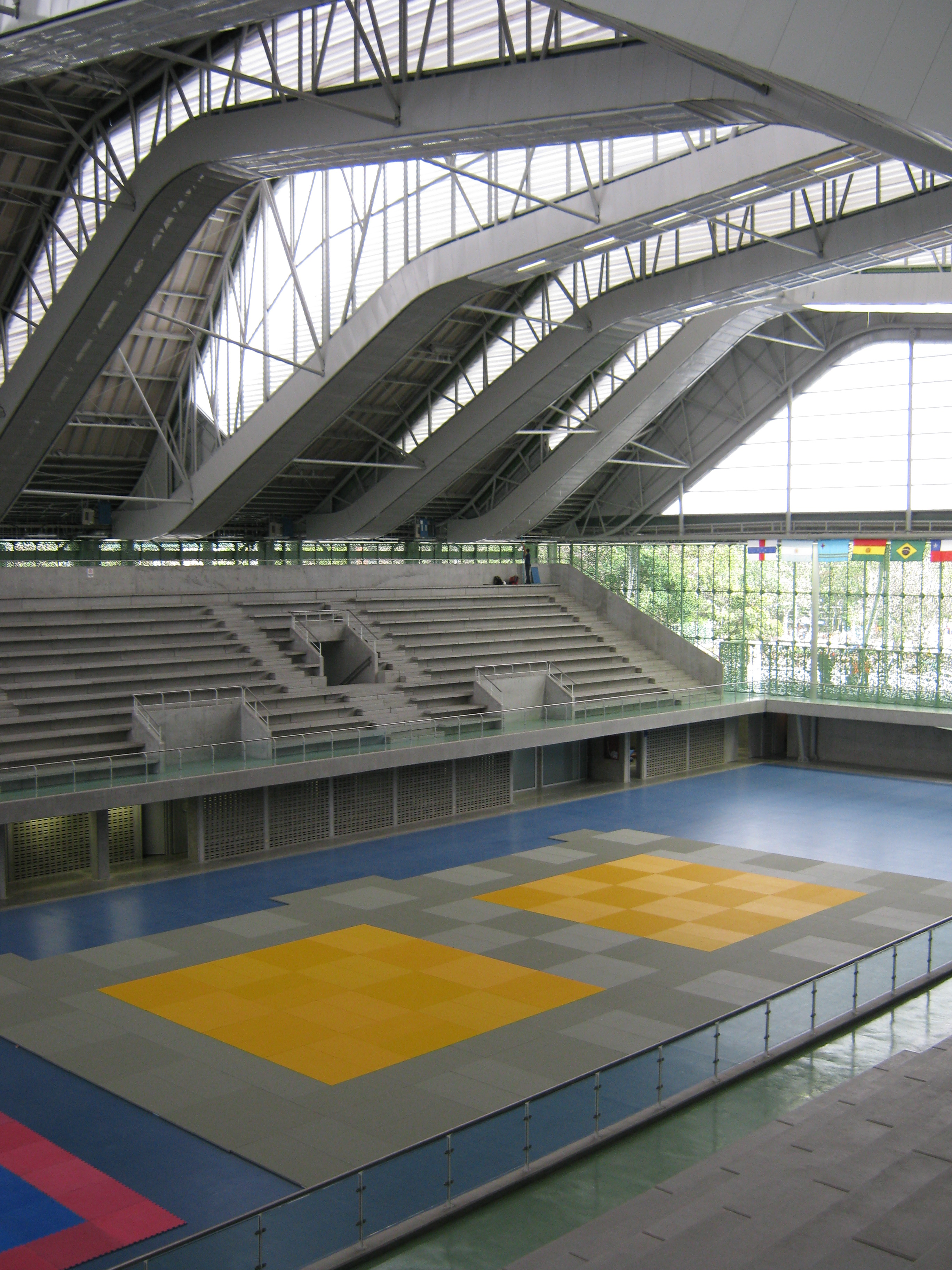 Interior del Coliseo de Combate, en la Unidad Deportiva Atanasio Girardot. Medellín. Colombia.